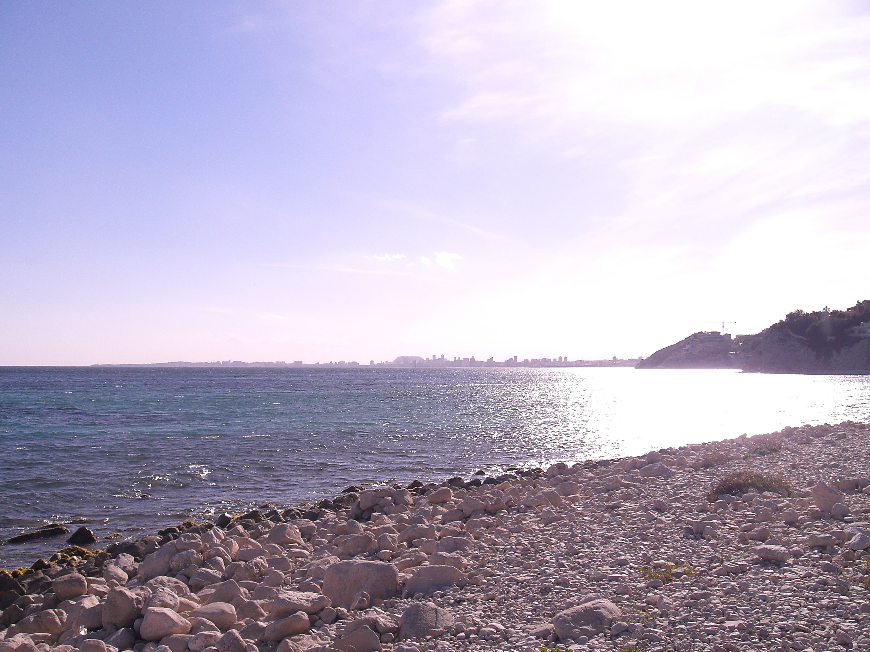 El Campello (Alacantí). Platja de la Coveta Fumada, des d'on es veu la Badia d'Alacant.